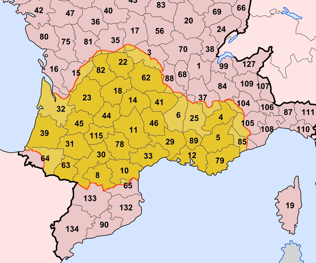 Occitània dins l'Empèri francés (frontièras de 1812).